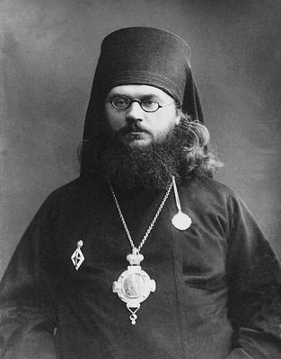 Еп. Арсений (Смоленец). Фотография. 10-е гг. XX в.